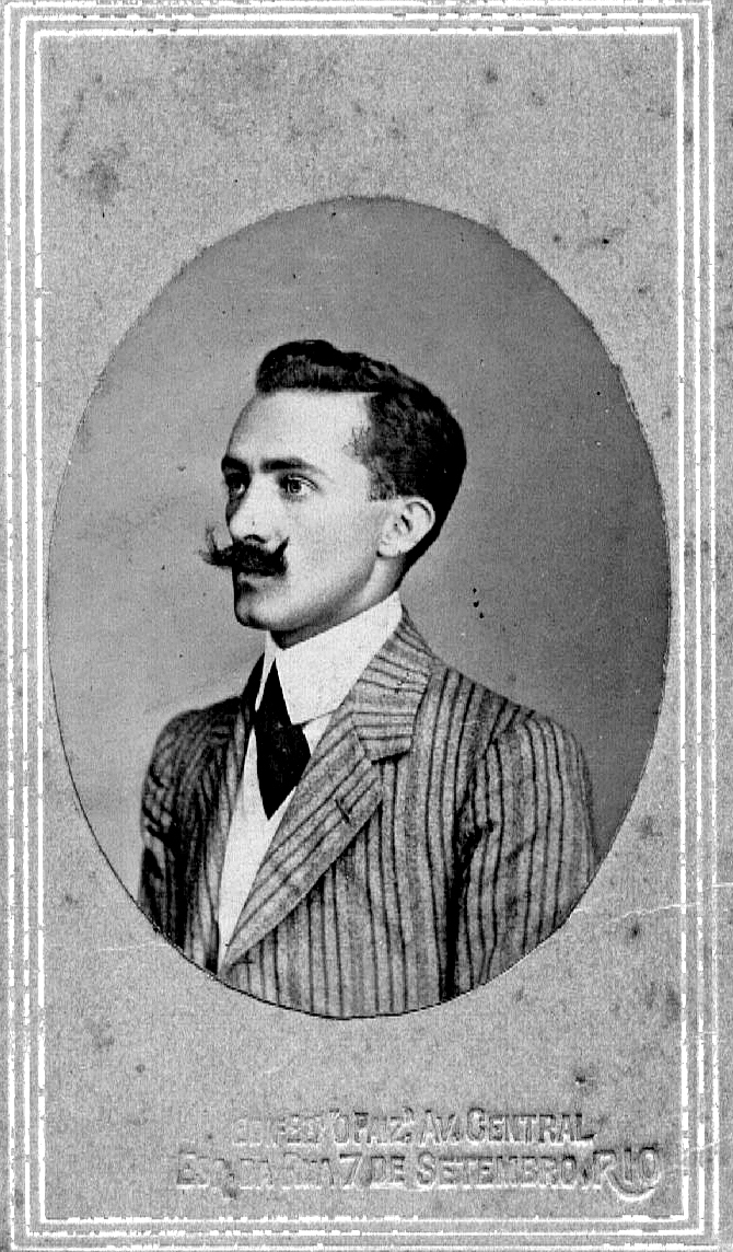 Mesma imagem, editada para ficar mais nítida e com cortes que valorizam o foco principal.